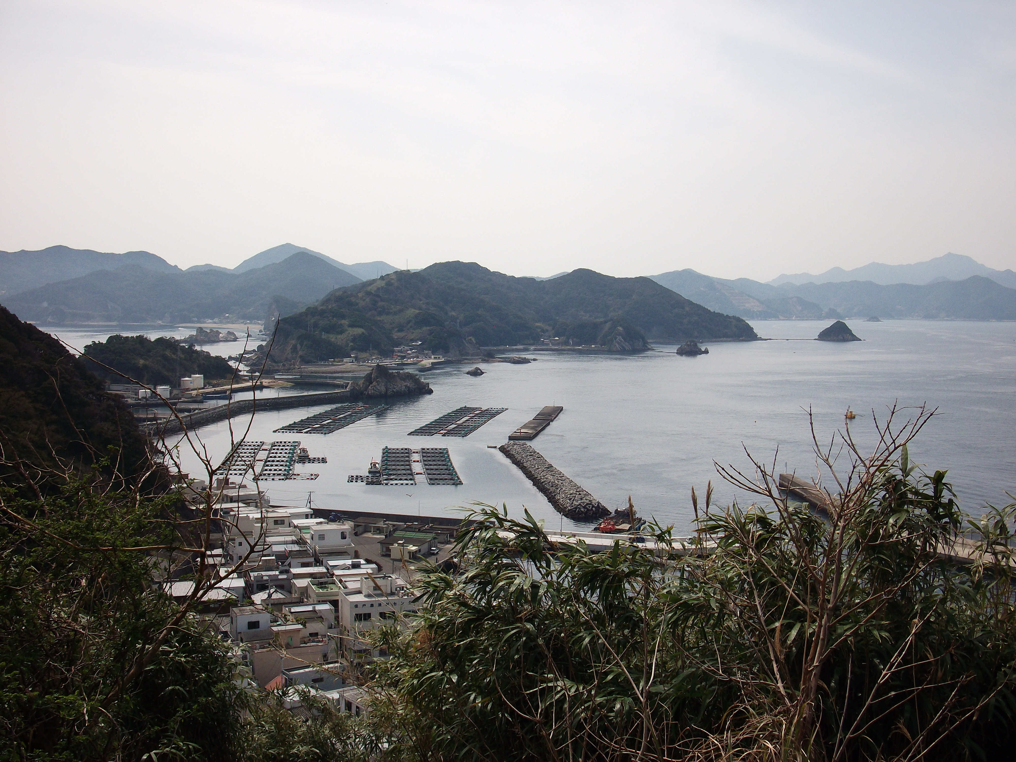 津久見市保戸島１